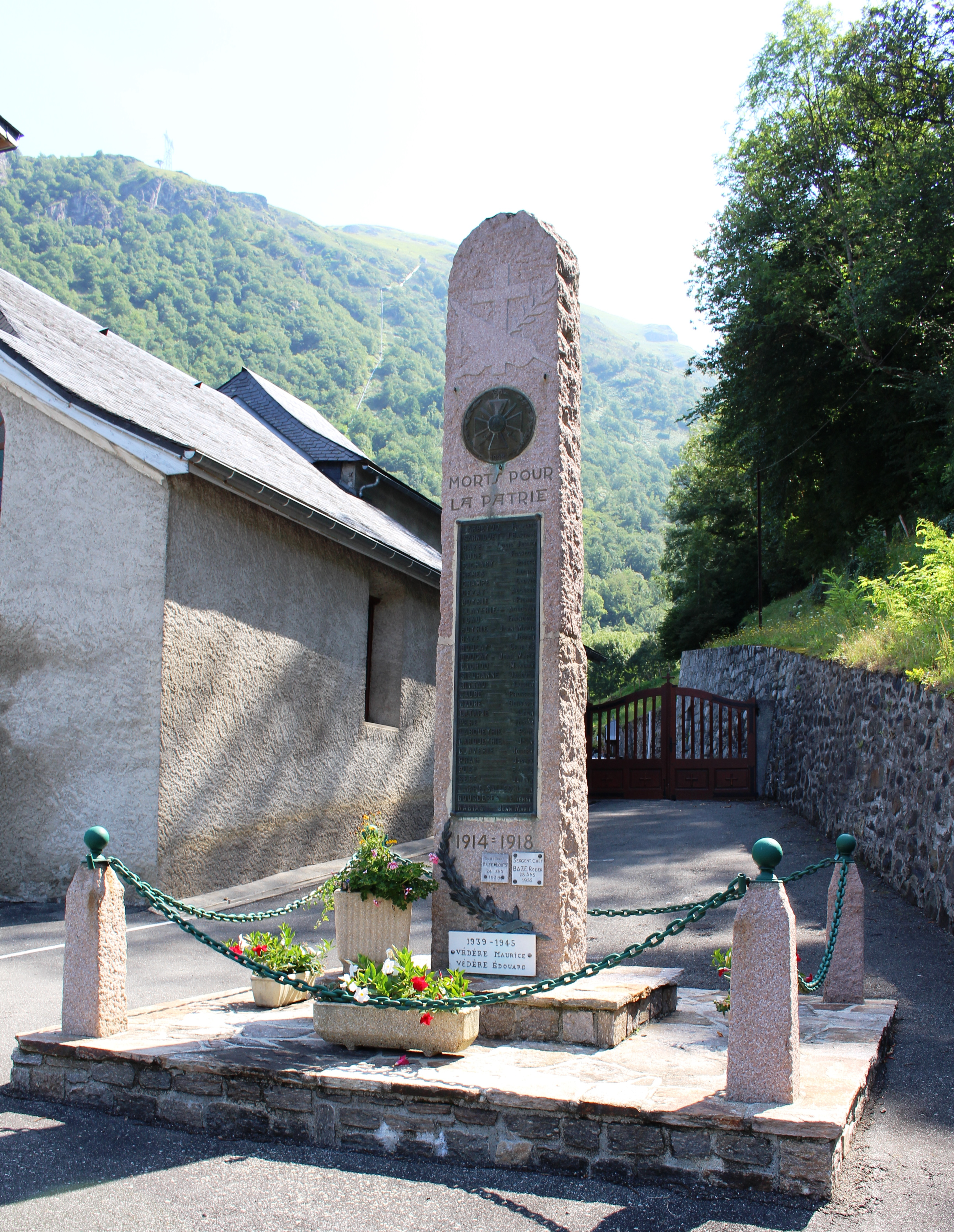 Monument aux morts de Villelongue (Hautes-Pyrénées)